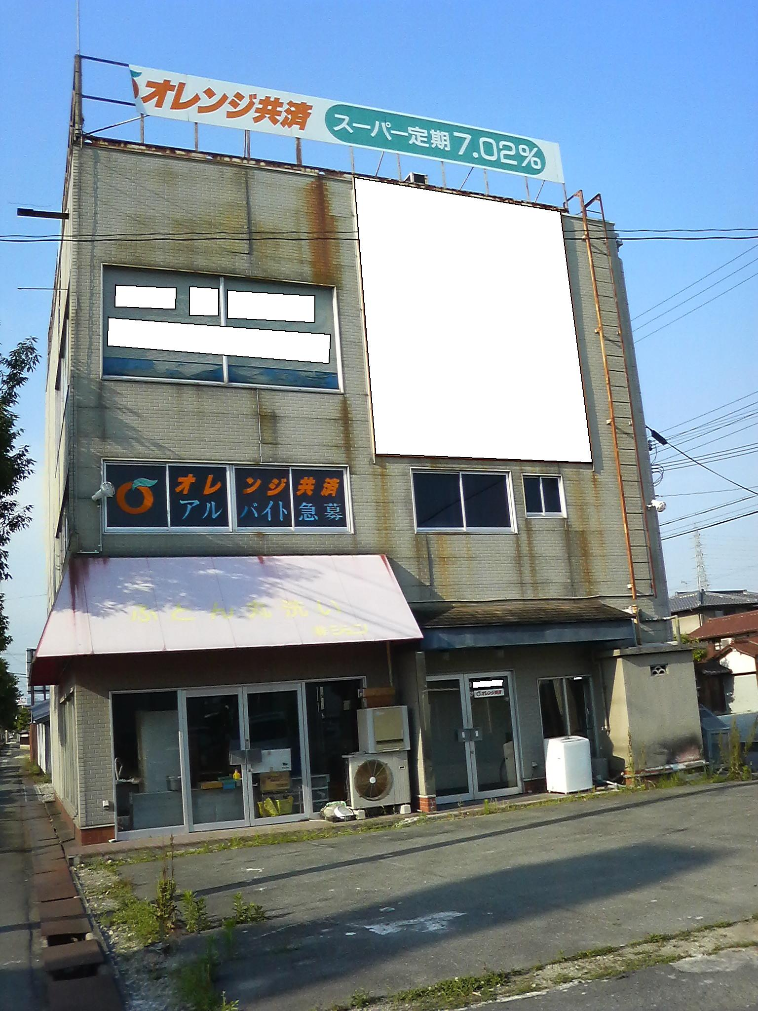 オレンジ共済の看板と現在は営業していない事務所